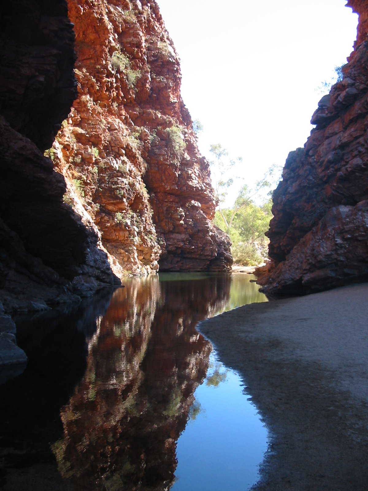 Rungutjirpa (vormals Simpson's Gap)